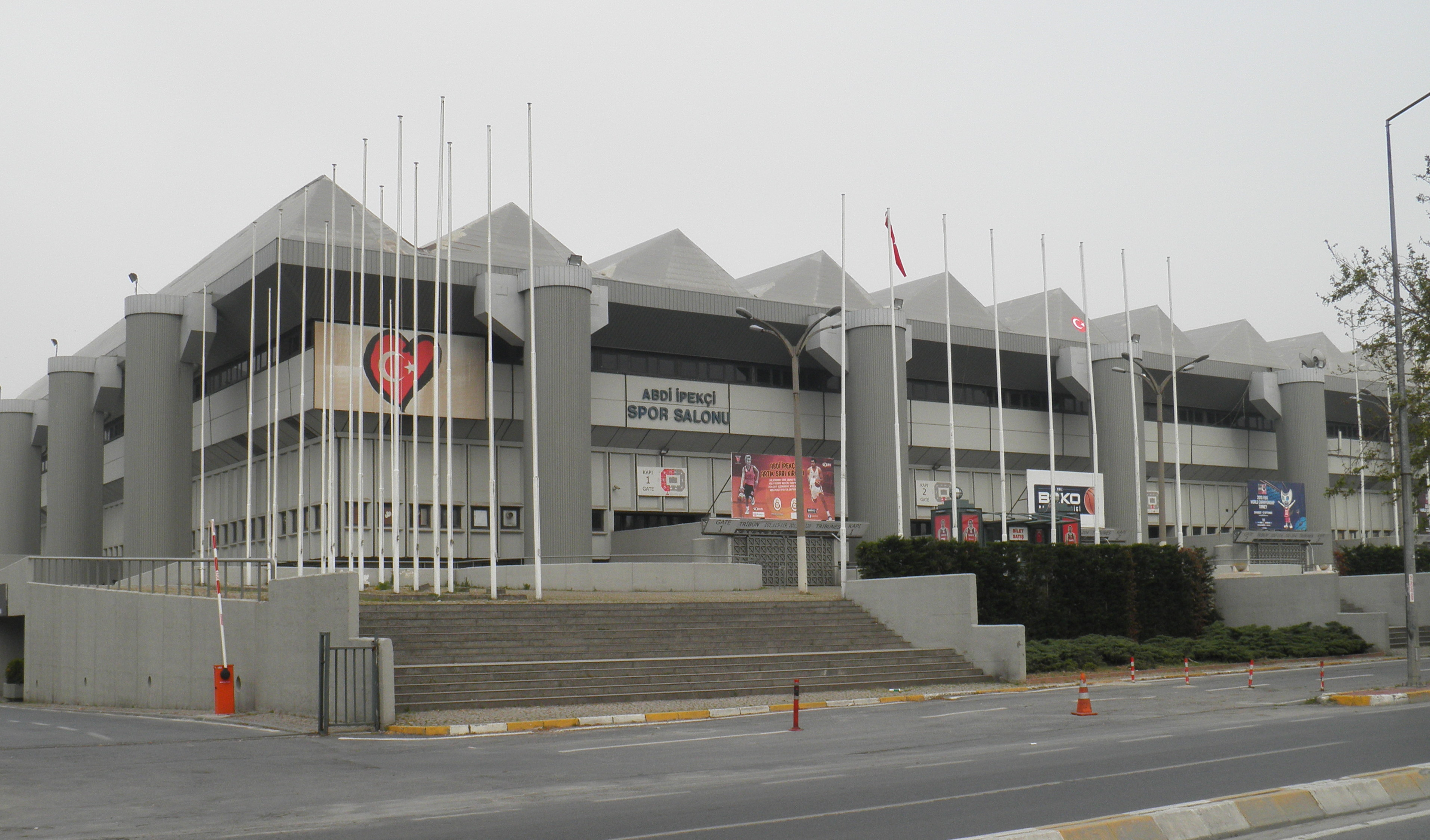 Abdi İpekçi Spor Salonu